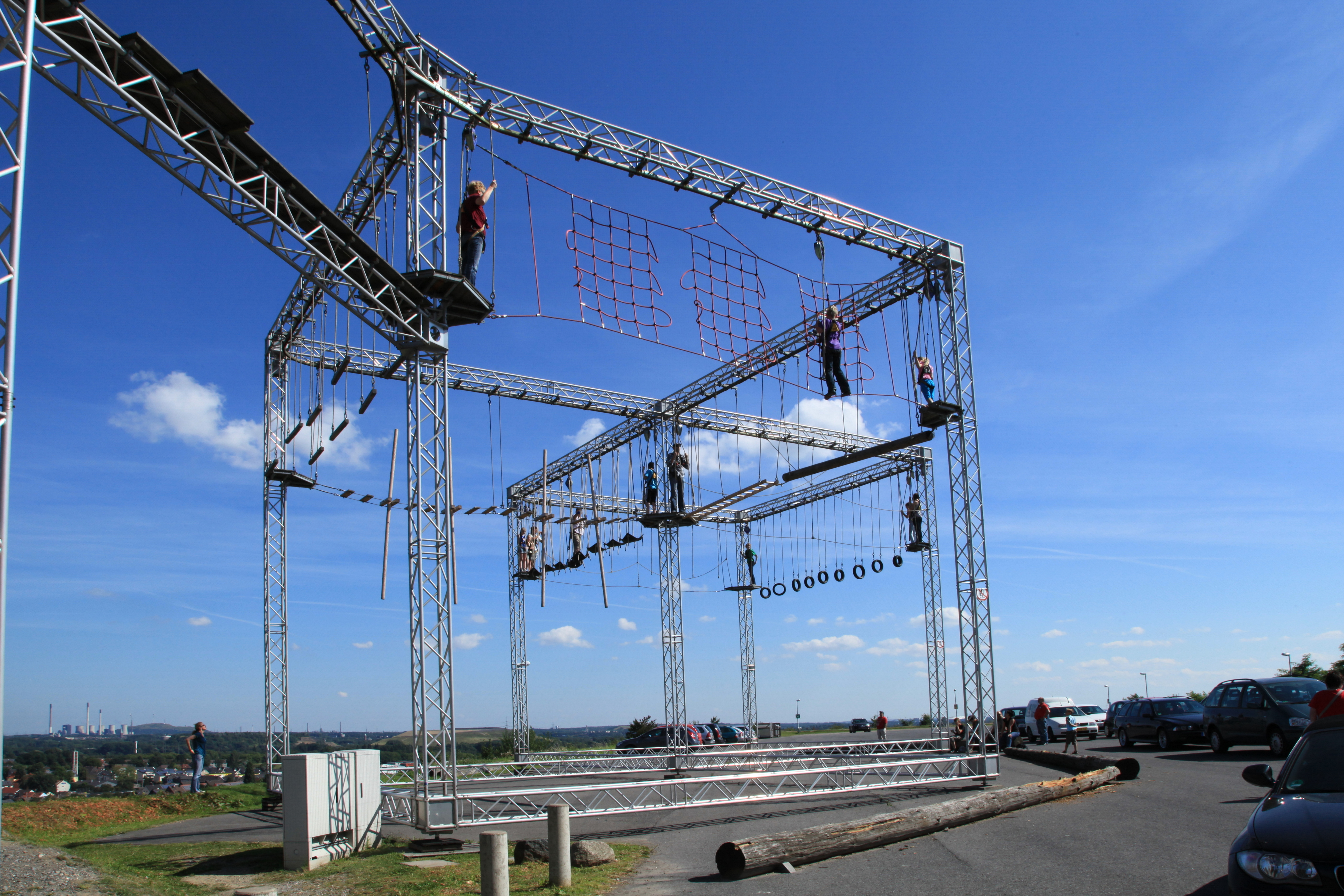 Hochseilklettergarten am Alpincenter auf der Halde Prosperstraße in Bottrop